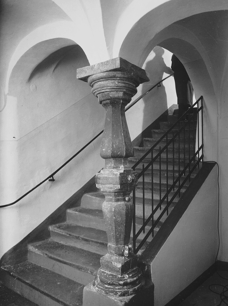 Österlånggatan 37, trappuppgång